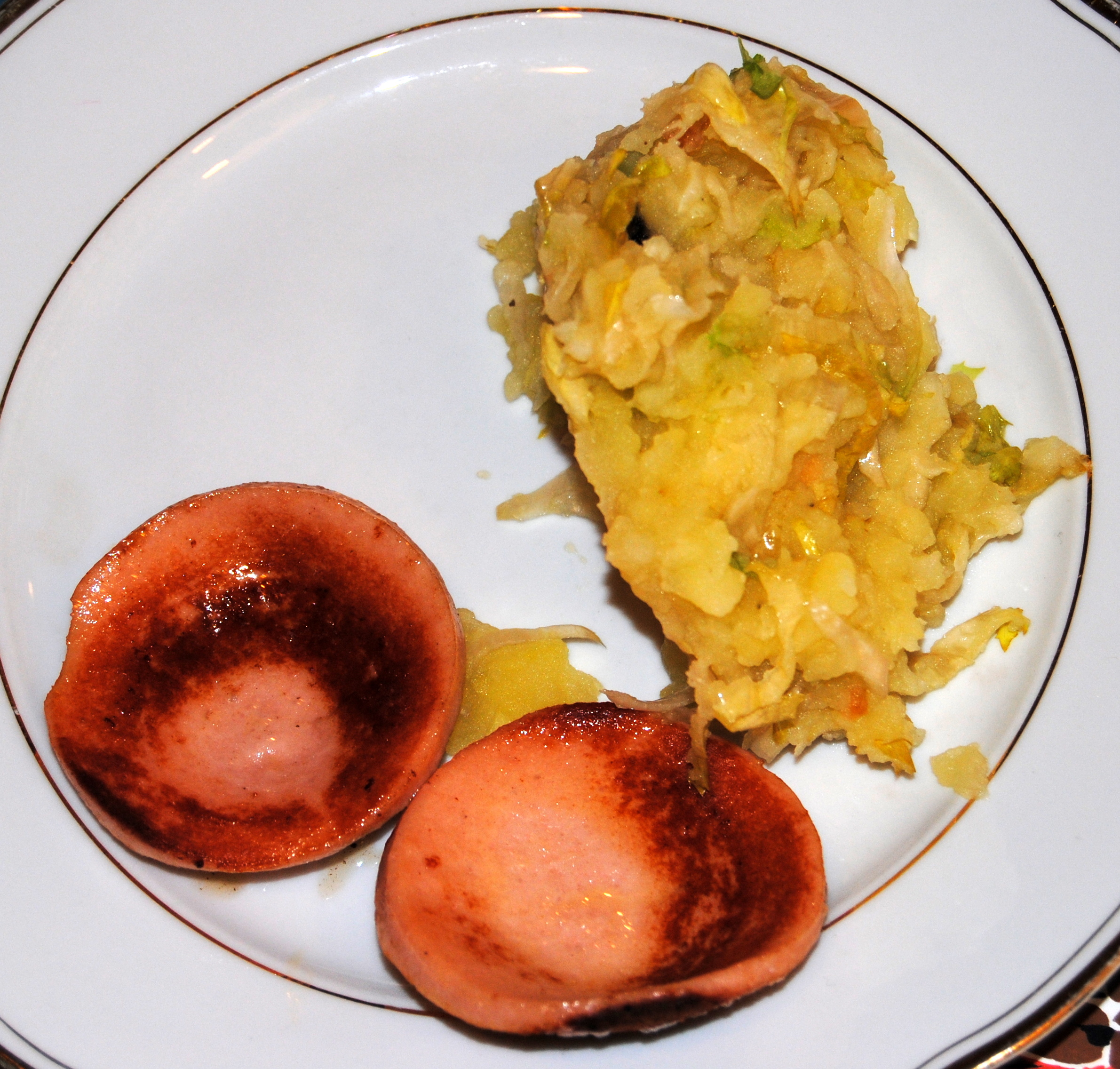 Endivien untereinander, serviert mit Fleischwurst This photograph was taken with a Nikon D3000.